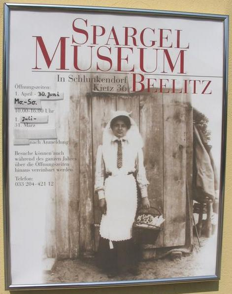 Plakat Spargelmuseum Beelitz in Schlunkendorf, bei Beelitz